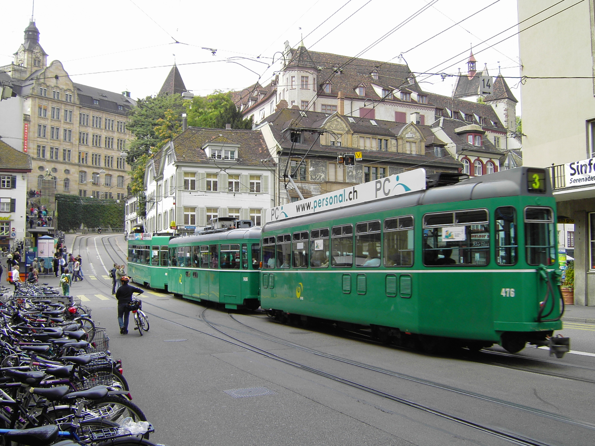 Beschreibung: Straßenbahn der Basler Verkehrs-Betriebe Quelle: selbst aufgenommen Fotograf: CrazyD, 16. Aufgust 2005 Lizenzstatus: GNU FDL Description: tram of the Basler Verkehrs-Betriebe Source: photo was taken by my self Photographer: CrazyD, 16 August 2005 Licence: GNU FDL